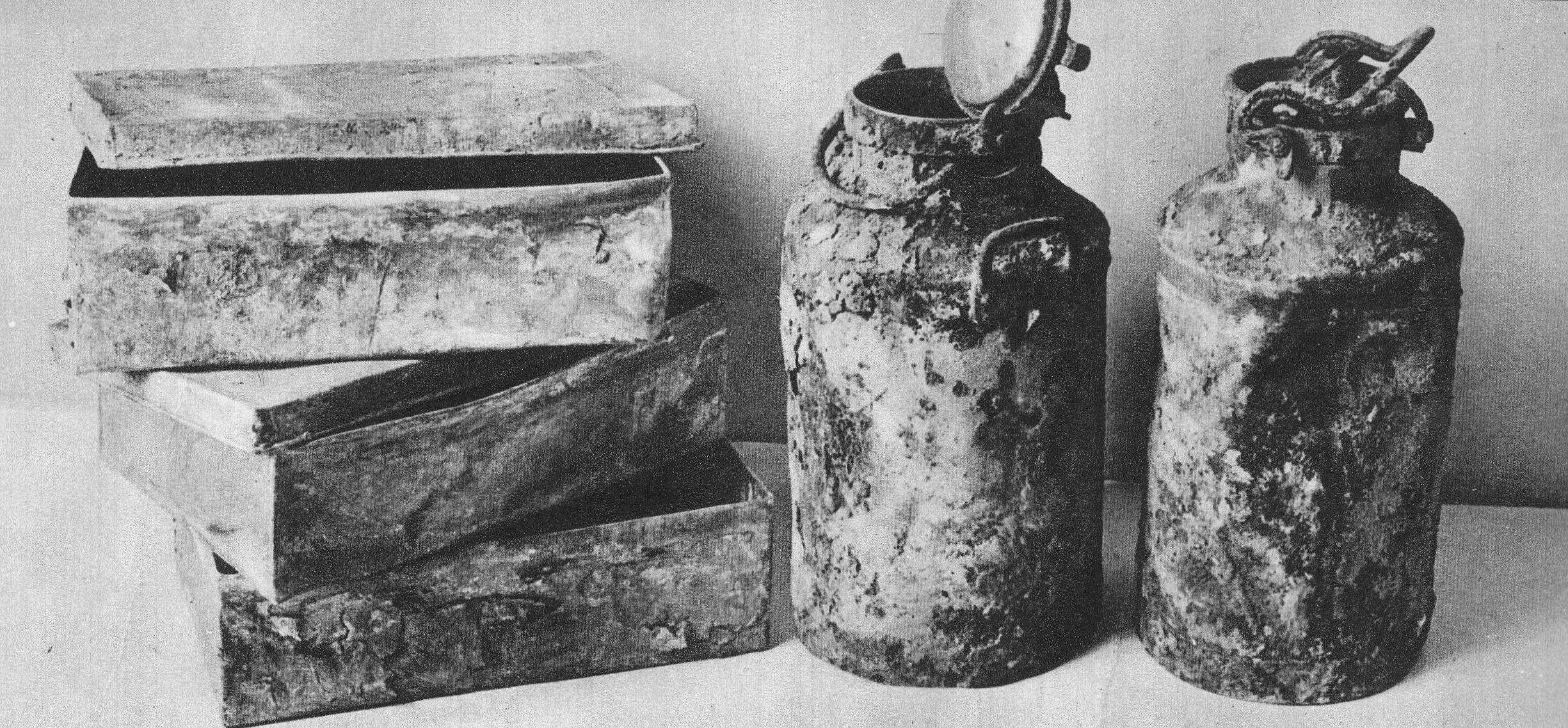 Trzy z dziesięciu metalowych skrzynek oraz dwie bański mleczarskie, w których ukryto Archiwum Ringelbluma (Oneg szabat)